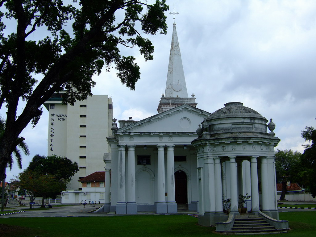 Georgetown - Penang - Malesia Chiesa anglicana di Saint George